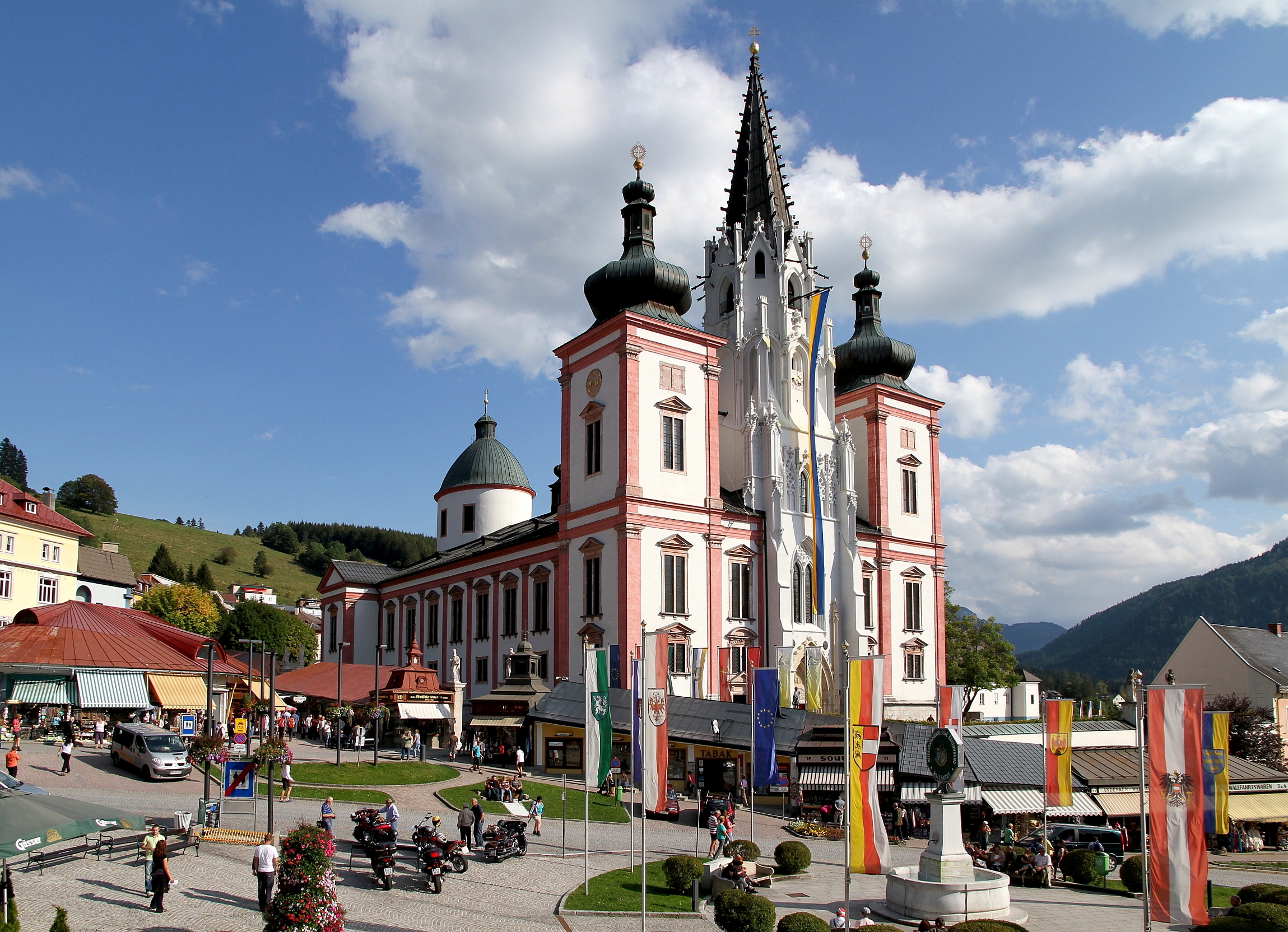 Die Nordwestansicht der Basilika, Pfarr- und Wallfahrtskirche Maria Geburt in der obersteirischen Stadt Mariazell.